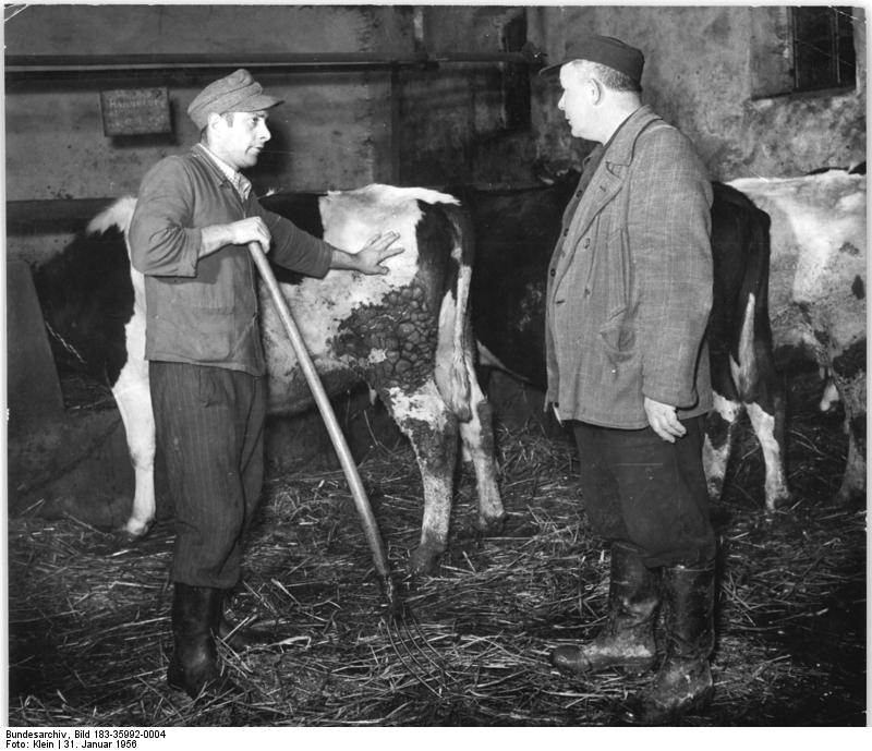 Bergholz, Bauern im Kuhstall Zentralbild Klein 31.1.1956 LPG "Neuland" wertet Beschlüsse der IV. LPG-Konferenz aus Die Beschlüsse der IV. LPG-Konferenz helfen den Landwirtschaftlichen Produktionsgenossenschaften, die Produktionspläne für 1956 richtig aufzustellen. Die LPG "Neuland" in Bergholz, Kre. Pasewalk, hat mit 72 (sieben zwei) Mitgliedern auf 720 ha (sieben zwei null) landwirtschaftlicher Nutzfläche bereits gute Erfolge erzielt. Aber es gibt doch noch verschiedene Schwächen, die die Genossenschaftsbauern durch die Verwirklichung der Beschlüsse der IV. LPG Konferenz überwinden wollen. UBz: Bisher arbeitete der Viehzuchtbrigadier noch nicht nach dem Leistungsprinzip. Für die richtige Pflege, Haltung und Fütterung der 232 (zwei drei zwei) Rinder waren die brigademitglieder zu wenig. So hat bisher der Melker Willi Rusch (links) 38 (drei acht) Kühe zu betreuen. In seinem Gespräch mit dem Parteisekretär Albert Kerner (rechts) weist er auf die Notwendigkeit der besseren Pflege der Tiere hin, die durch einen zweiten Melker möglich wird."